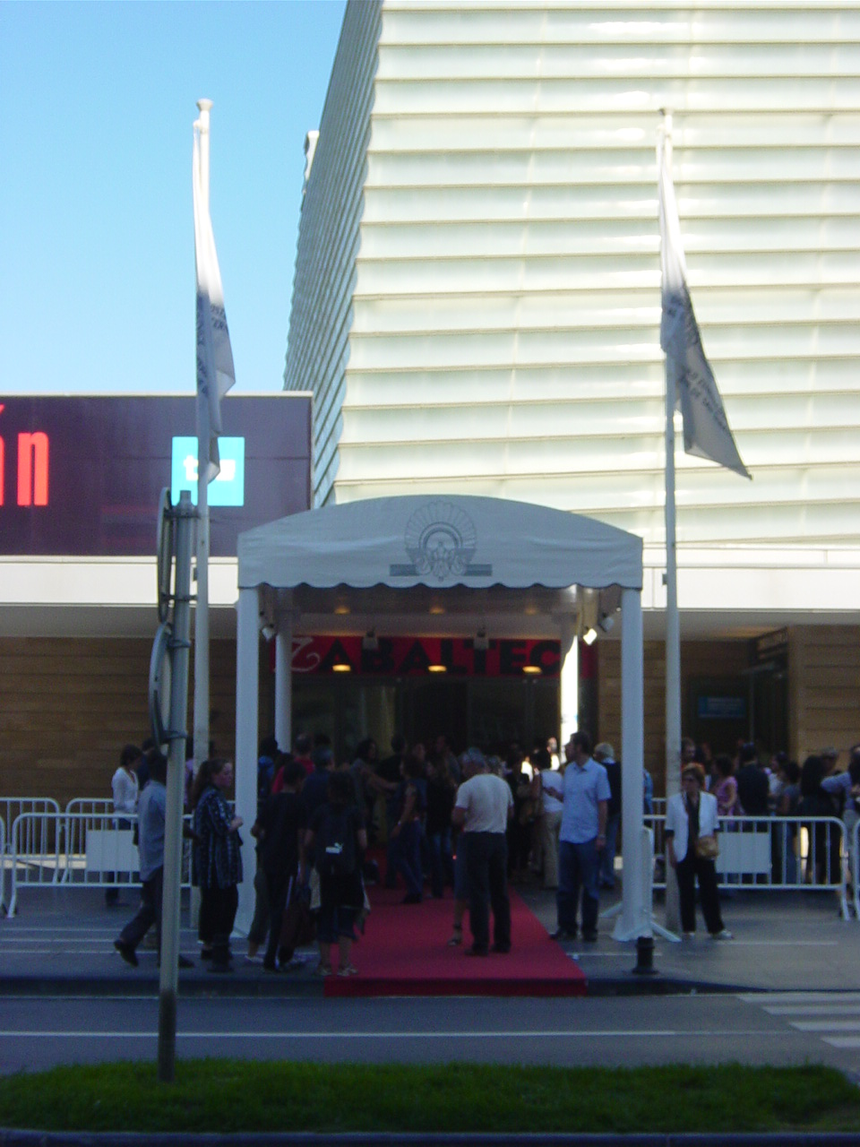 Zabaltegi, entrada (San Sebastián, Festival Internacional, España)